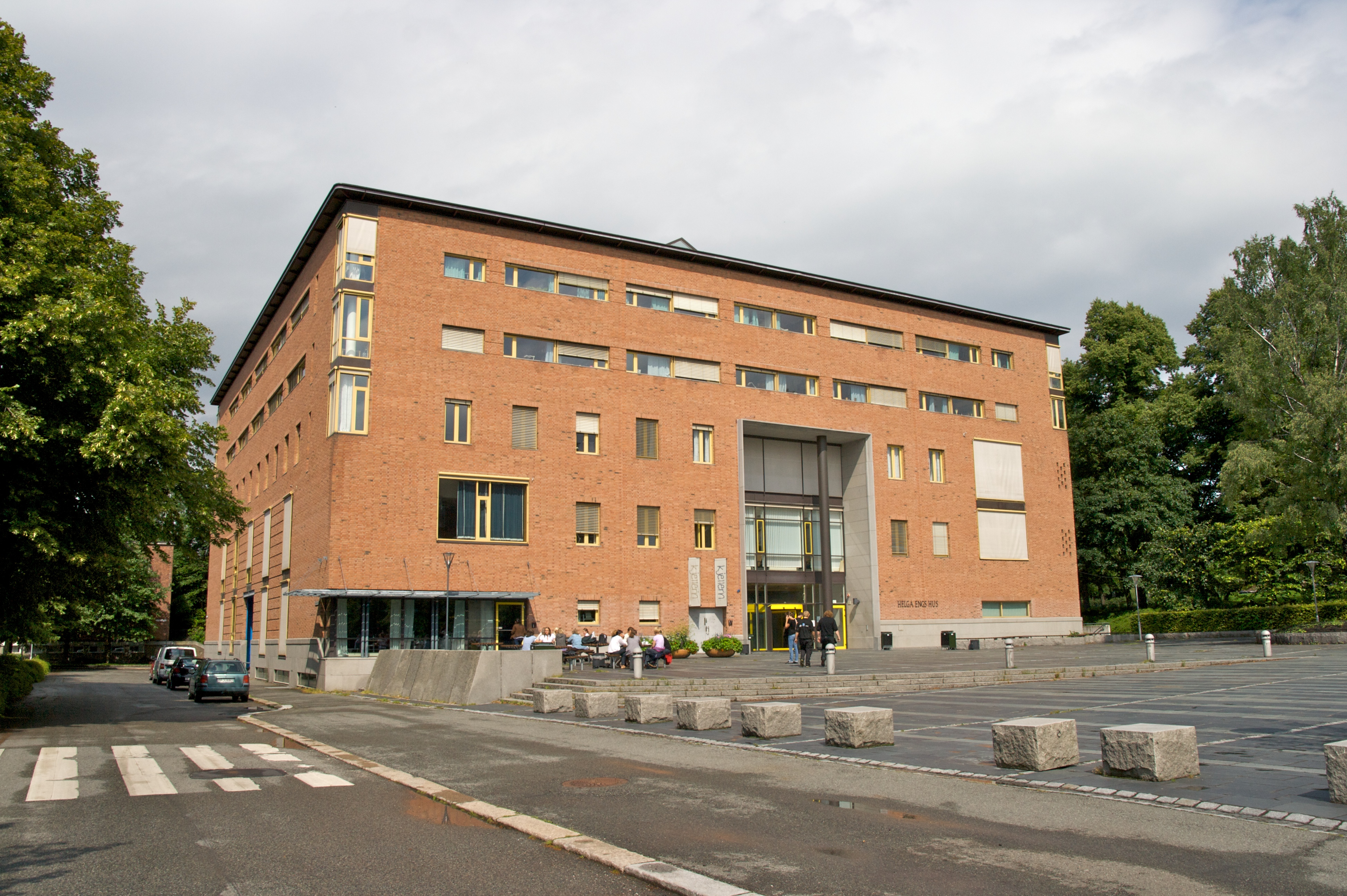 Helga Engs hus, Universitetet i Oslo.